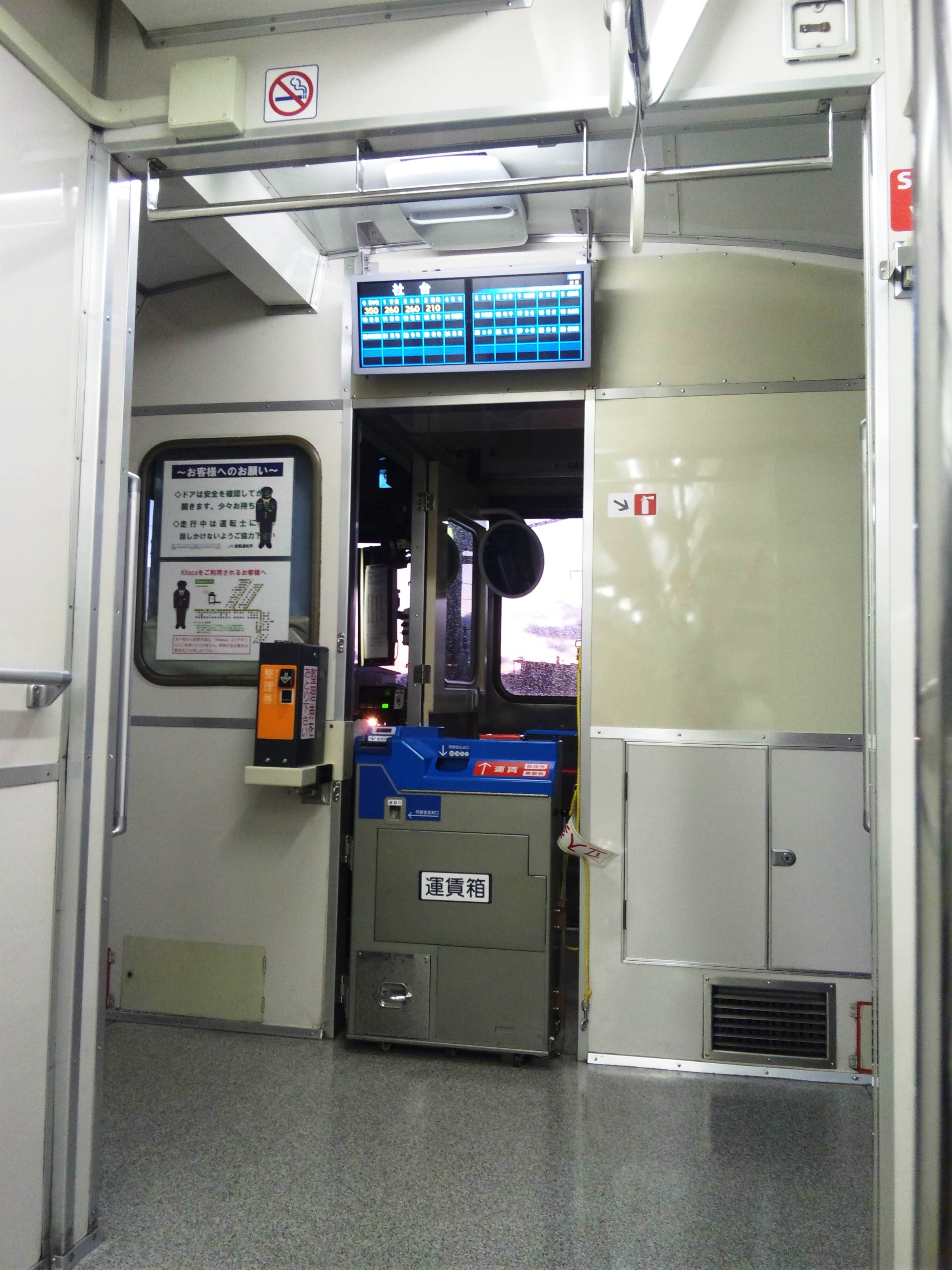 苗穂工場でワンマン運転対応工事実施、完了済み後の営業運転中の様子。JR北海道の普通ワンマン気動車では初の運賃表示器にLCDディスプレイを採用している。